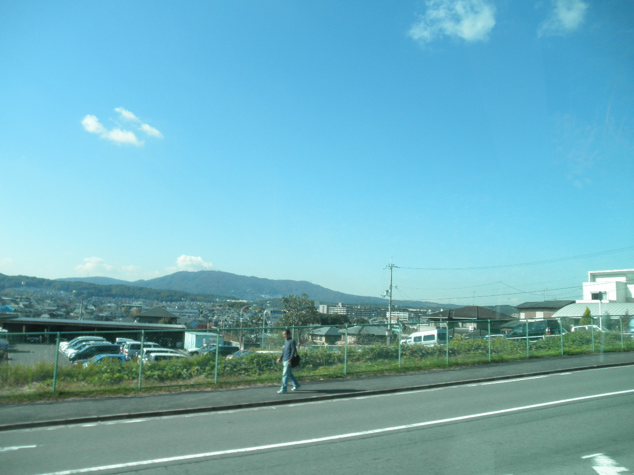 奈良県奈良市学園中 遠景